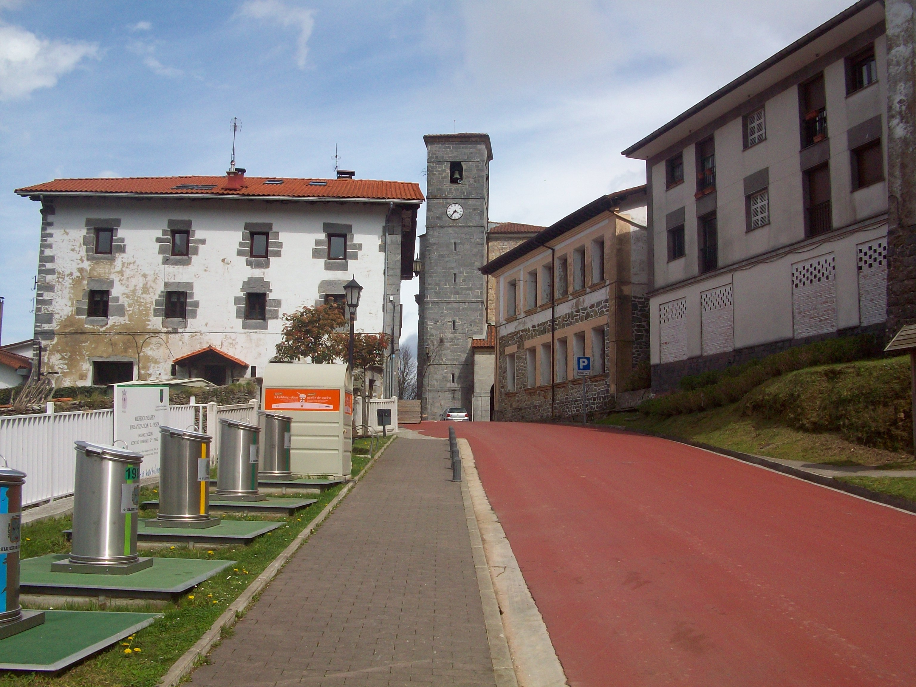 Alkiza, Tolosaldea. Gipuzkoa, Euskal Herria. Alkiza, Tolosaldea. Guipuscoa, Basque Country.